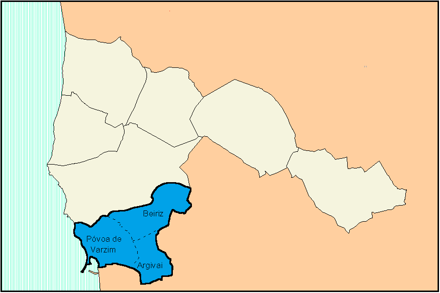 Antigas freguesias constituintes da atual freguesia de Póvoa de Varzim, Beiriz e Argivai.